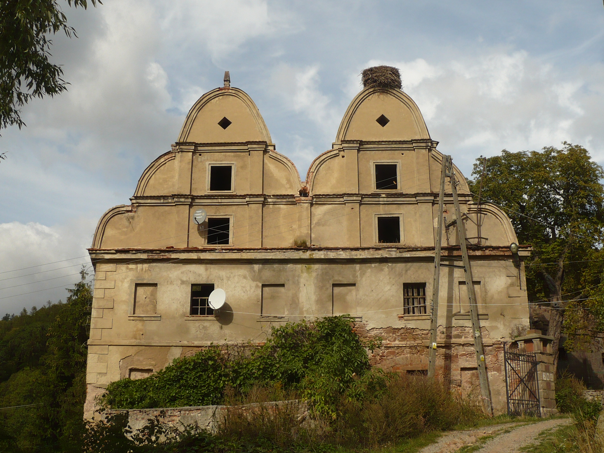 Sarny. Spichlerz